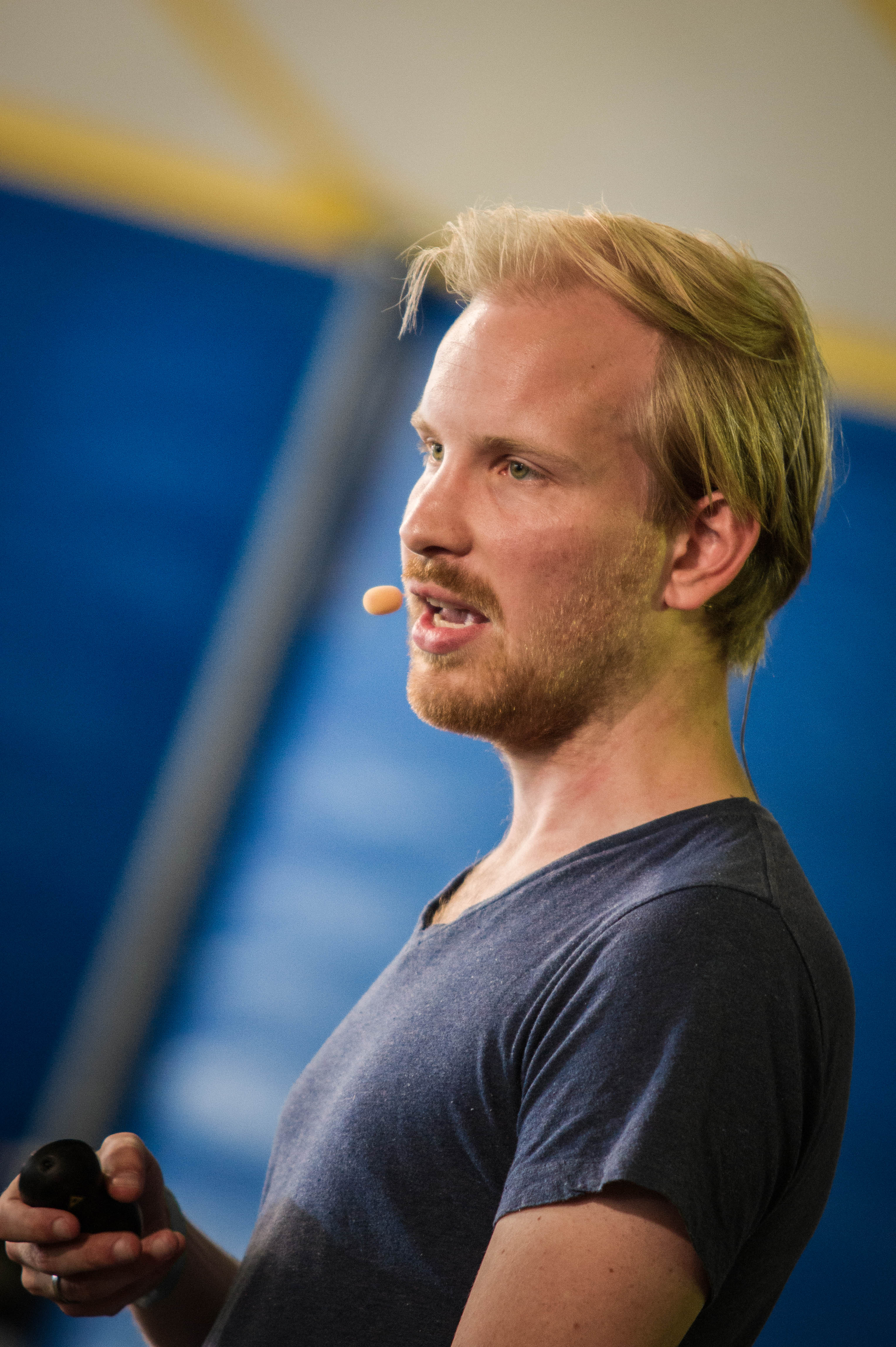 Geschiedkundige en opiniemaker Rutger Bregman op Festival de Beschaving in Utrecht